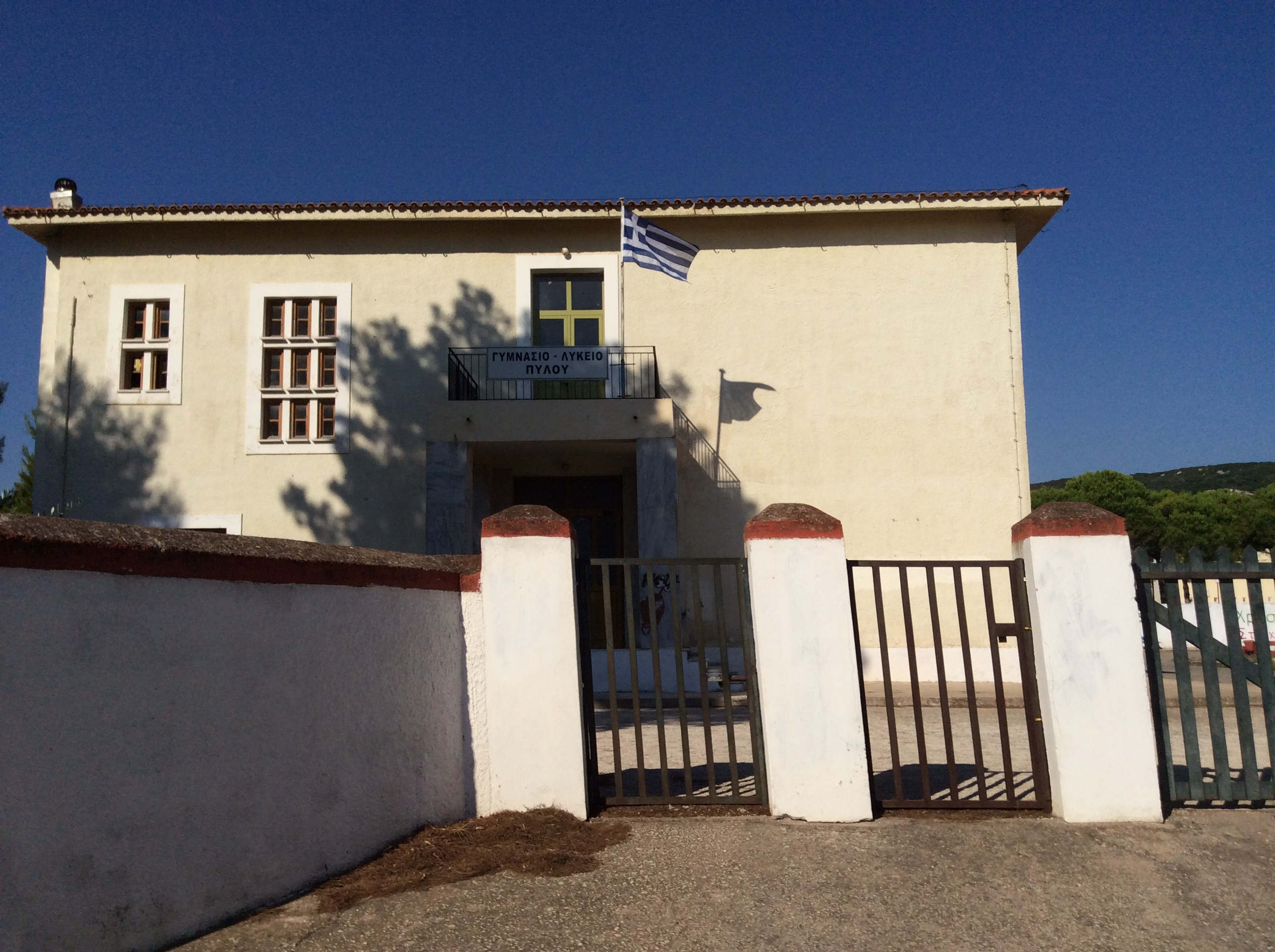 Πύλος - Το Γυμνάσιο και το Λύκειο της Πύλου.